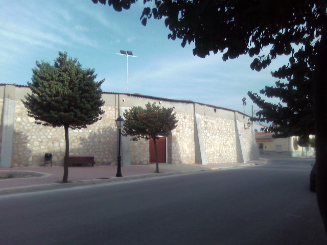 Plaza de toros de Pedro Muñoz por la entrada de sombra.